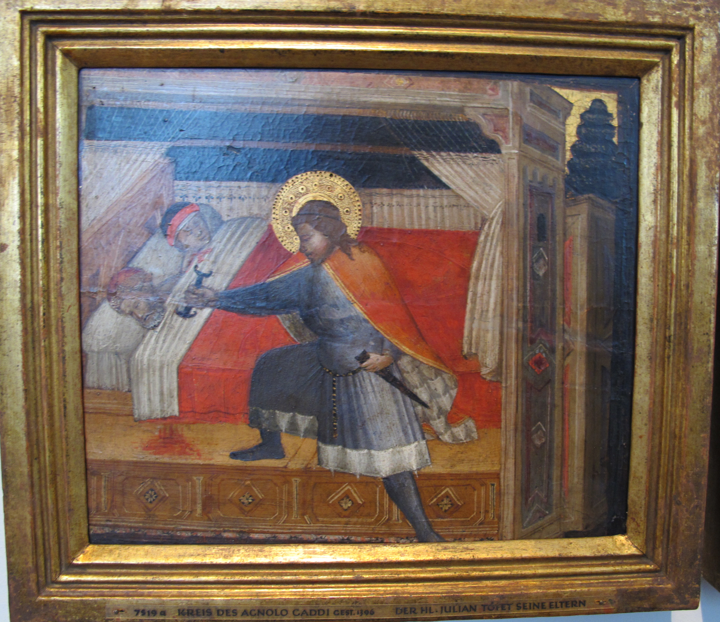 Storie di san giuliano